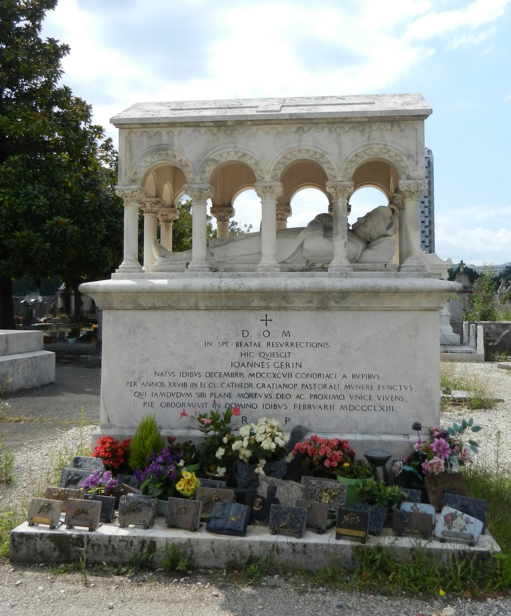 Gisant de l'abbé Gerin (1797-1863) toujours fleuri au cimetière Saint-Roch de Grenoble.